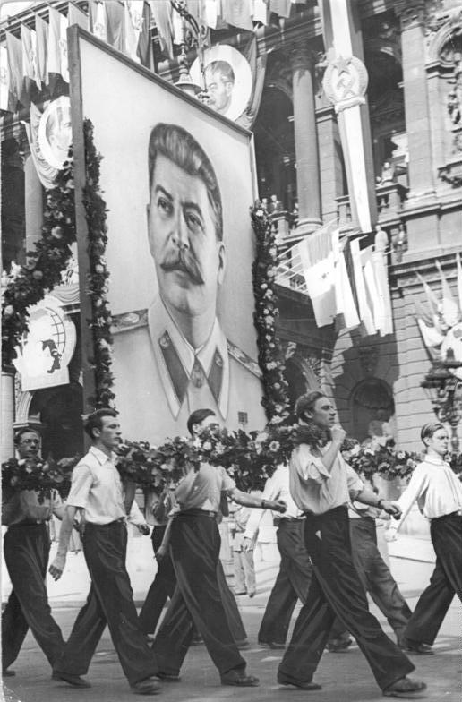 Budapest, II. Weltfestspiele, Festumzug Weltjugendspiele in Budapest beendet-. Am 28.August 1949 verabschiedeten sich die ausländischen Delegierten der Weltjugendspiele von Budapest und seiner gastfreundlichen Bevölkerung.Eine große Schlußdemonstration, an der sich alle Delegierten beteiligten, bildeten den Abschluß der Festspiele.In endlos scheinenden Zügen zogen die Delegierten der einzelnen Nationen durch die Straßen der ungarischen Hauptstadt zum Heldenplatz, wo der stellv.Ministerpräsident Matyas Rakosi eine Ansprache hielt.Die Vertreter der Weltjugend gelobten dort, daß sie ihren Kampf für den Frieden bis zum Sieg fortsetzen werden UBzJugend des Komsomol trägt das Bild Stalins im Festzug.Foto:Illus